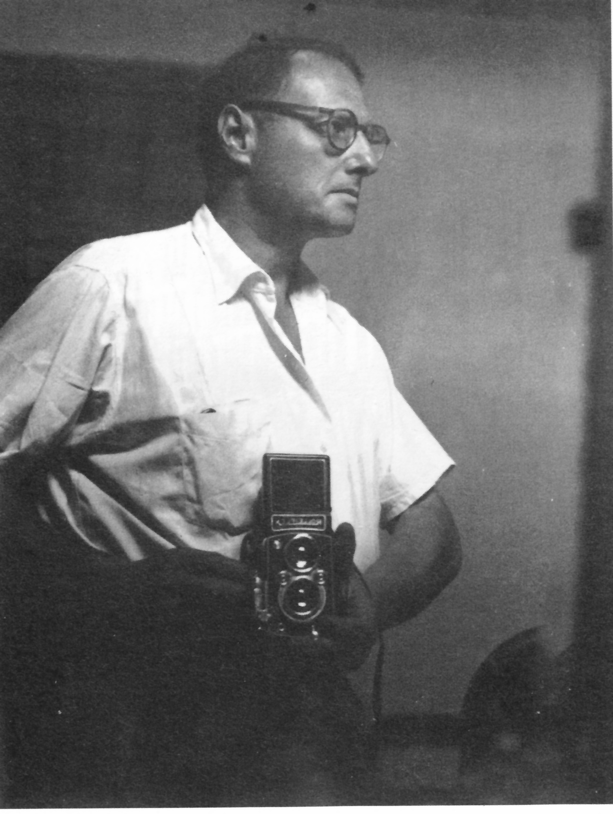 Autoportrait de Pierre Verger